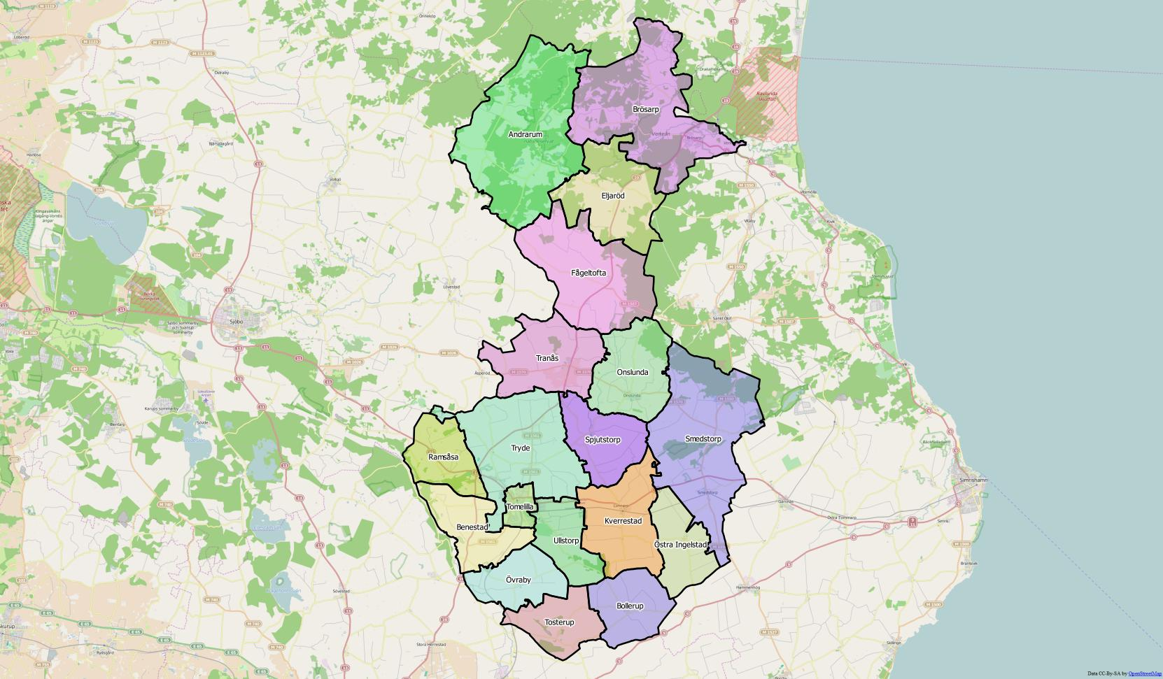 Distriktsindelningen i kommunen.